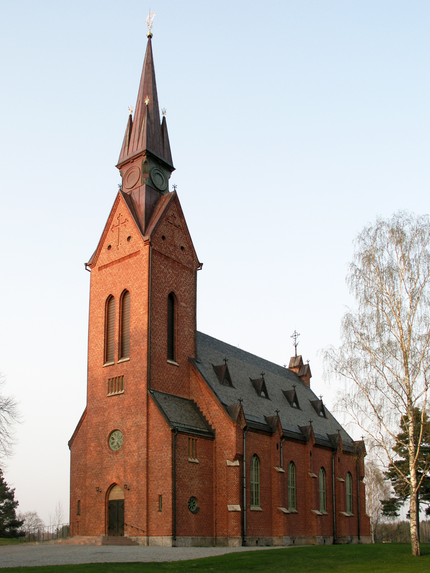 Ny kyrka/Ny church, Arvika, Sweden